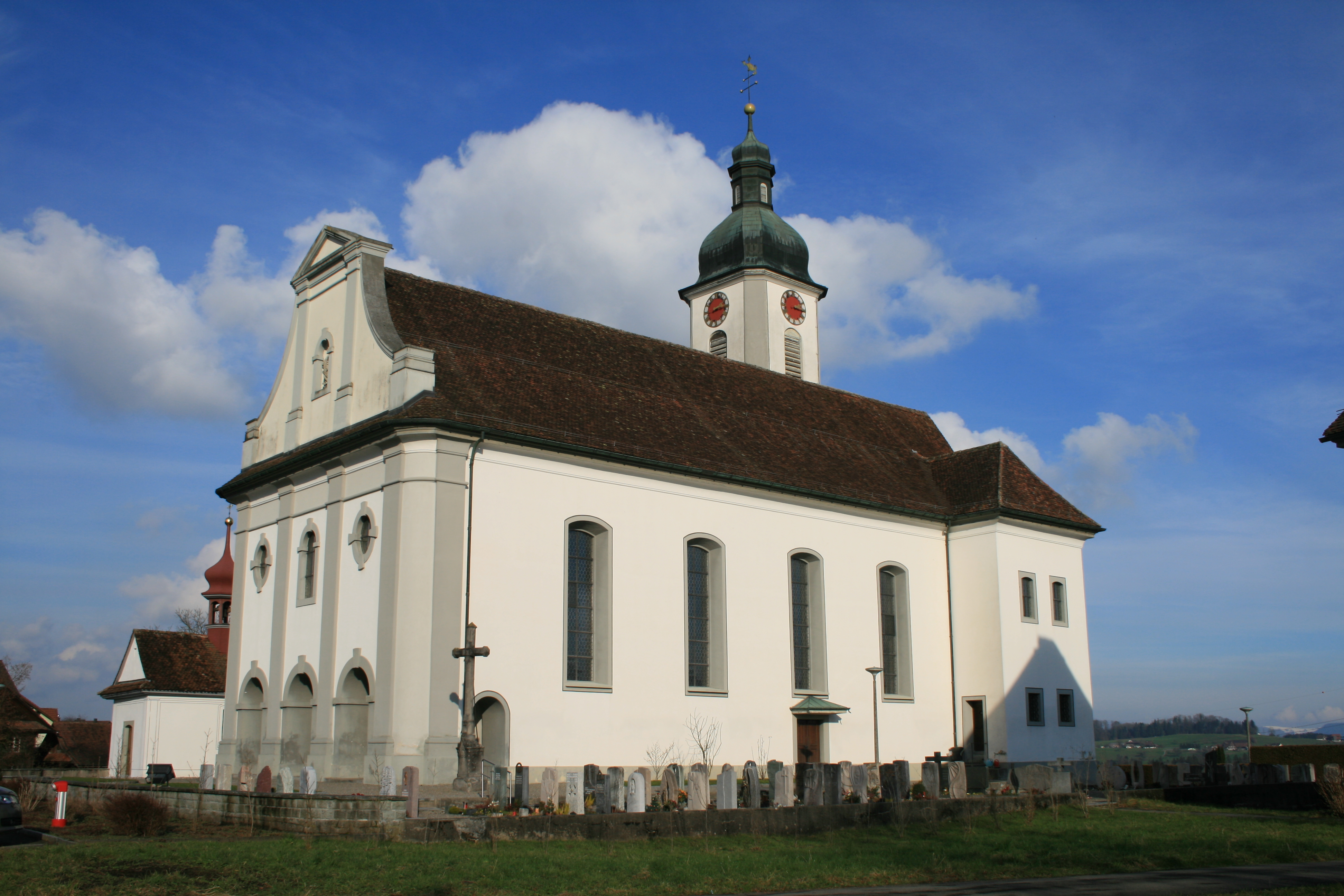 Dietwil